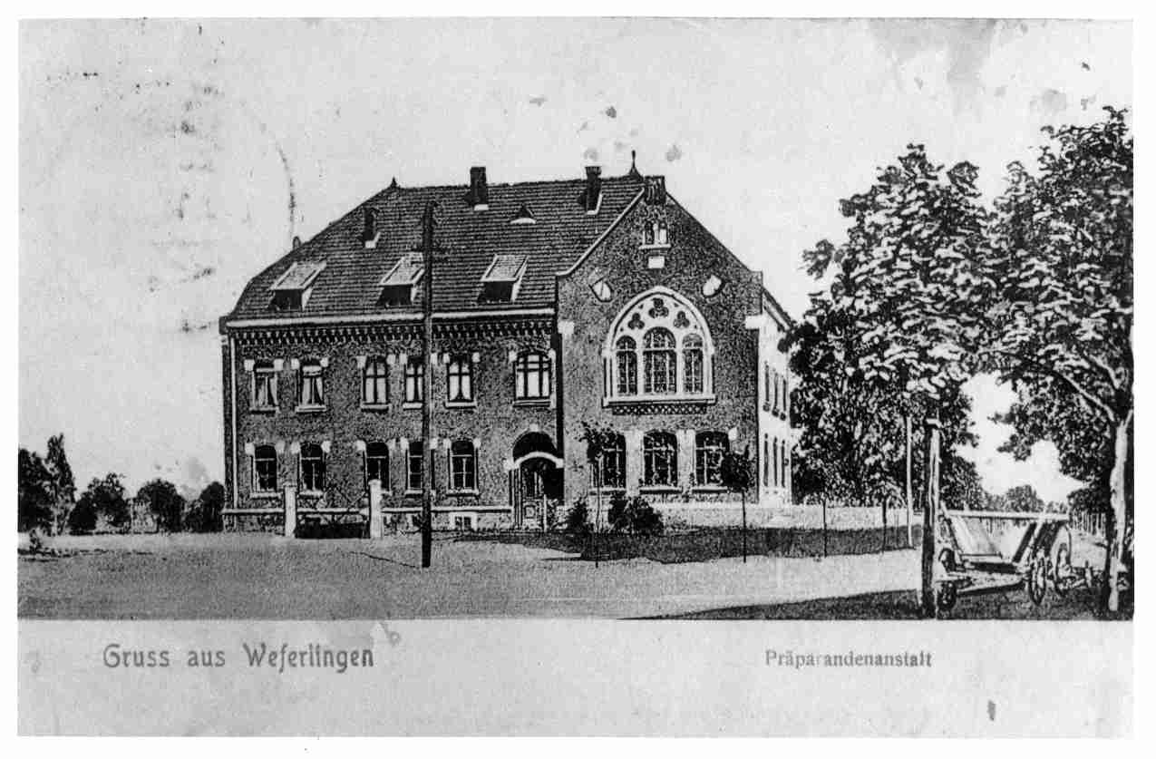 Freiherr-vom-Stein-Gymnasium (Weferlingen)